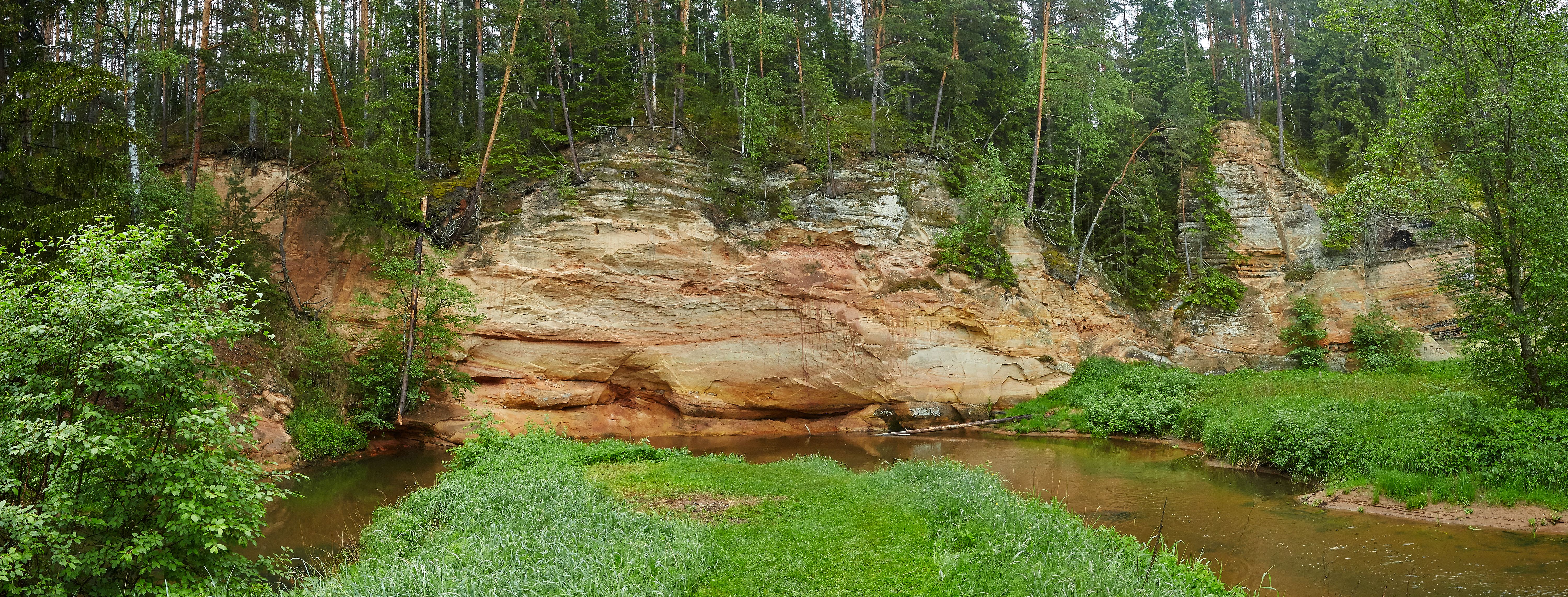 Härma Alumine müür Piusa jõe kaldal. Panoraam kolmest fotost.